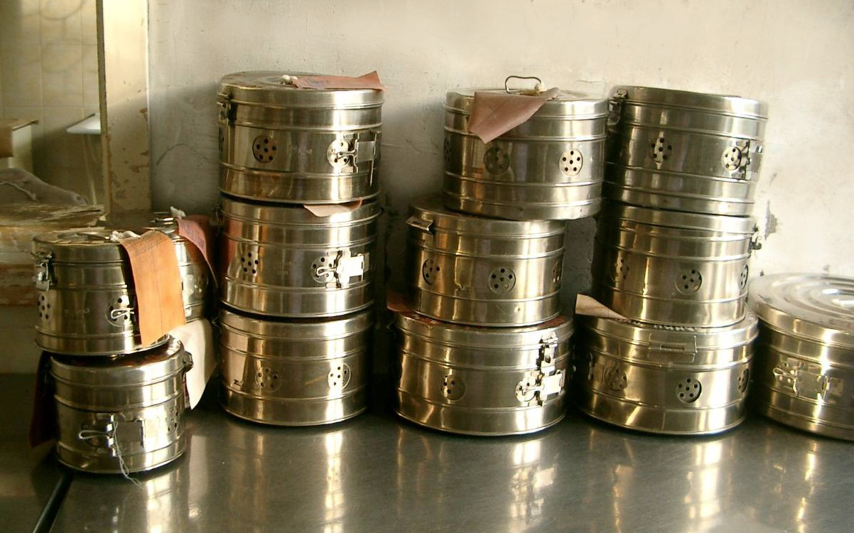 На изображении несколько биксов